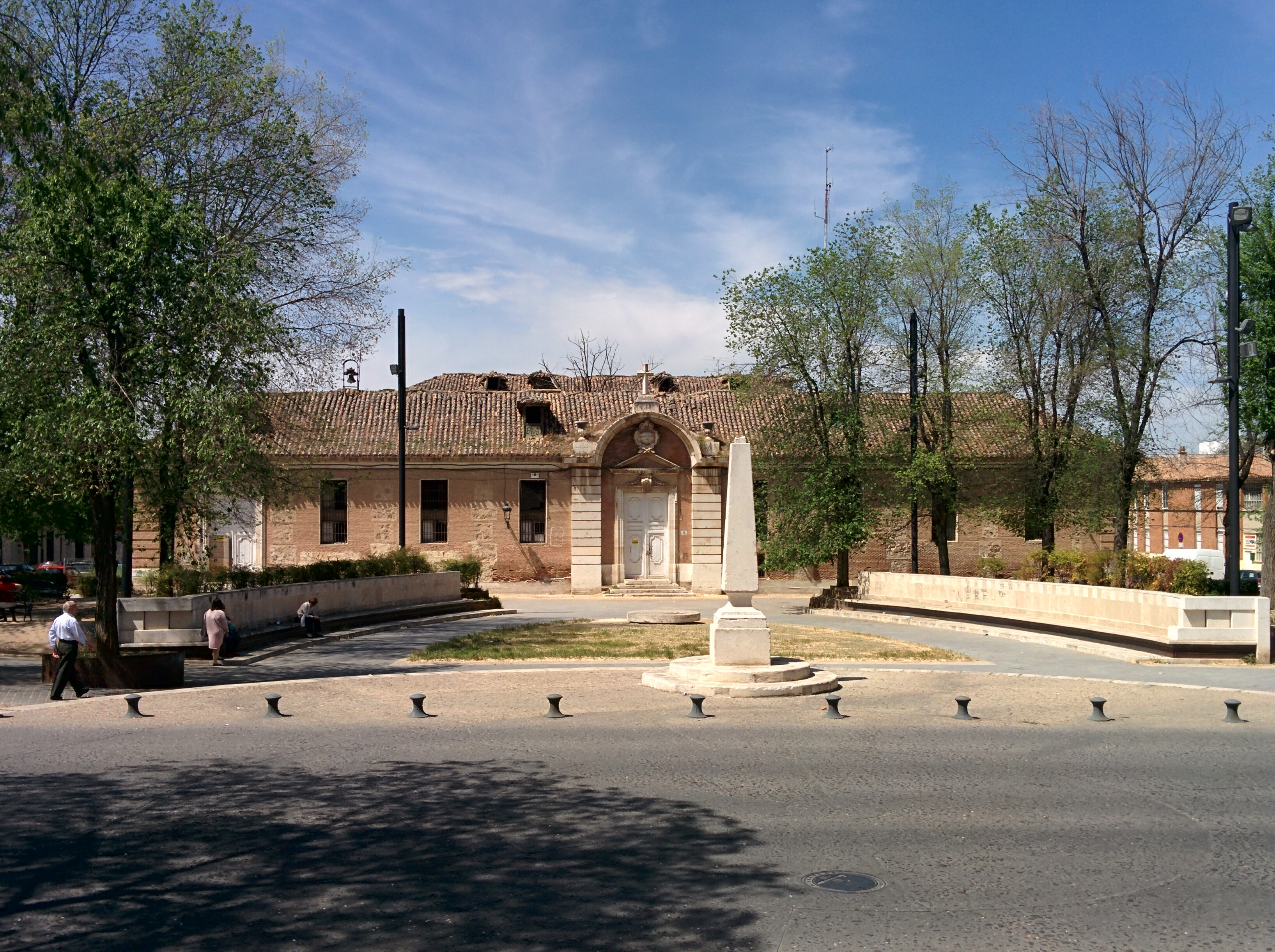 Hospital de San Carlos, en Aranjuez (Madrid, España).